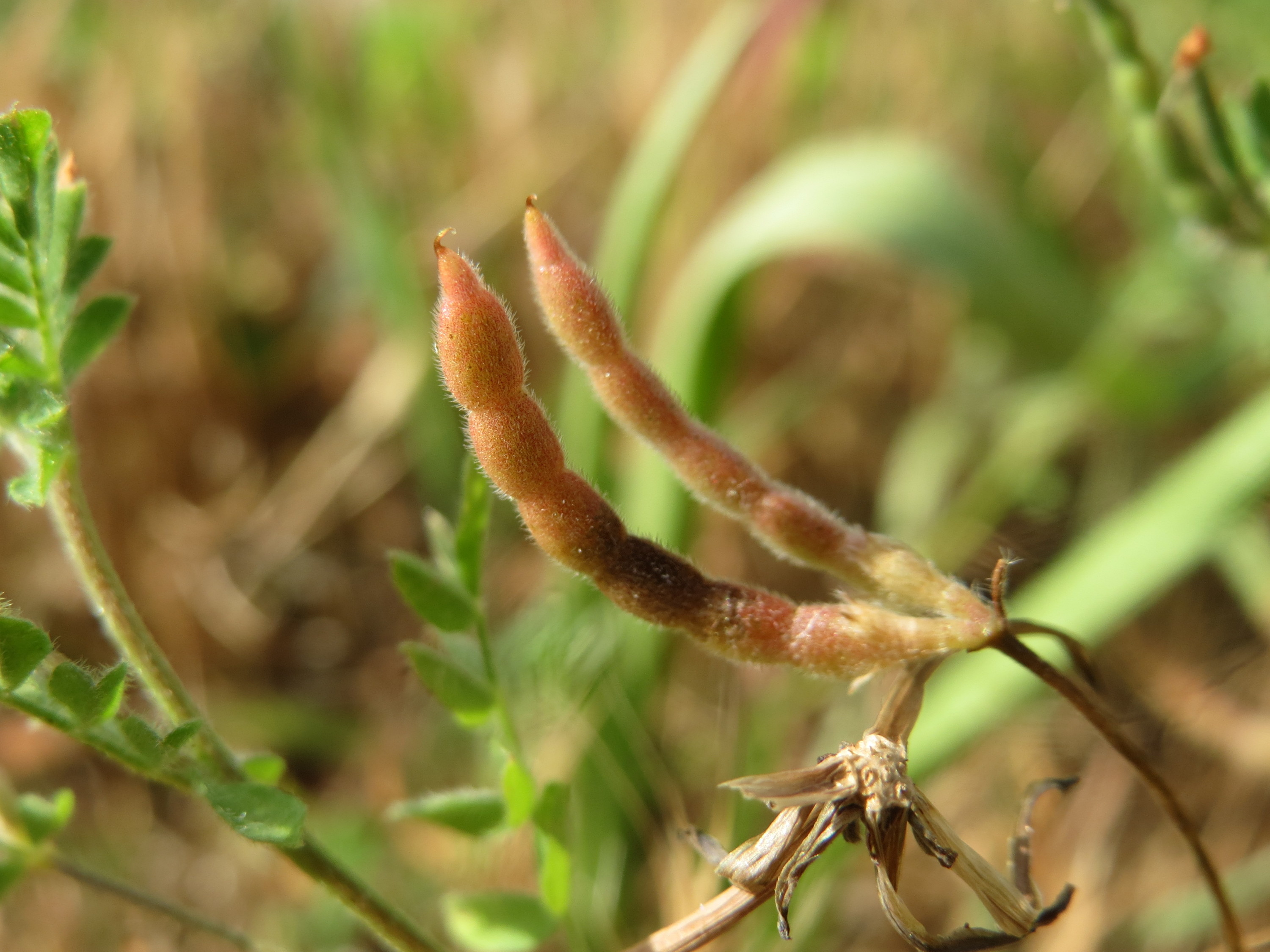 Kleiner Vogelfuß oder Mäusewicke (Ornithopus perpusillus) in Hockenheim